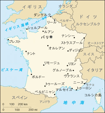 フランスの地図（日本語版） PDの CIA The World Factbook のファイルを日本語化